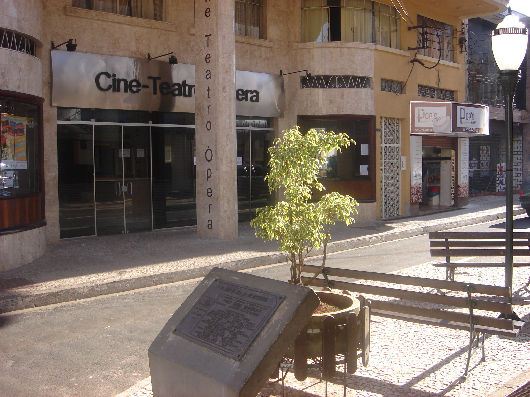 Ponta Grossa, Cine Teatro Opera